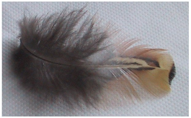 Feder eines Fasan (Phasianus colchicus)